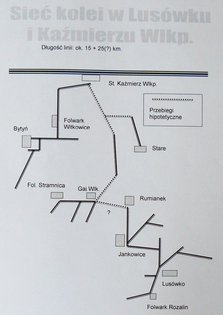 Schemat przebiegu kolei folwarcznej w Lusówku